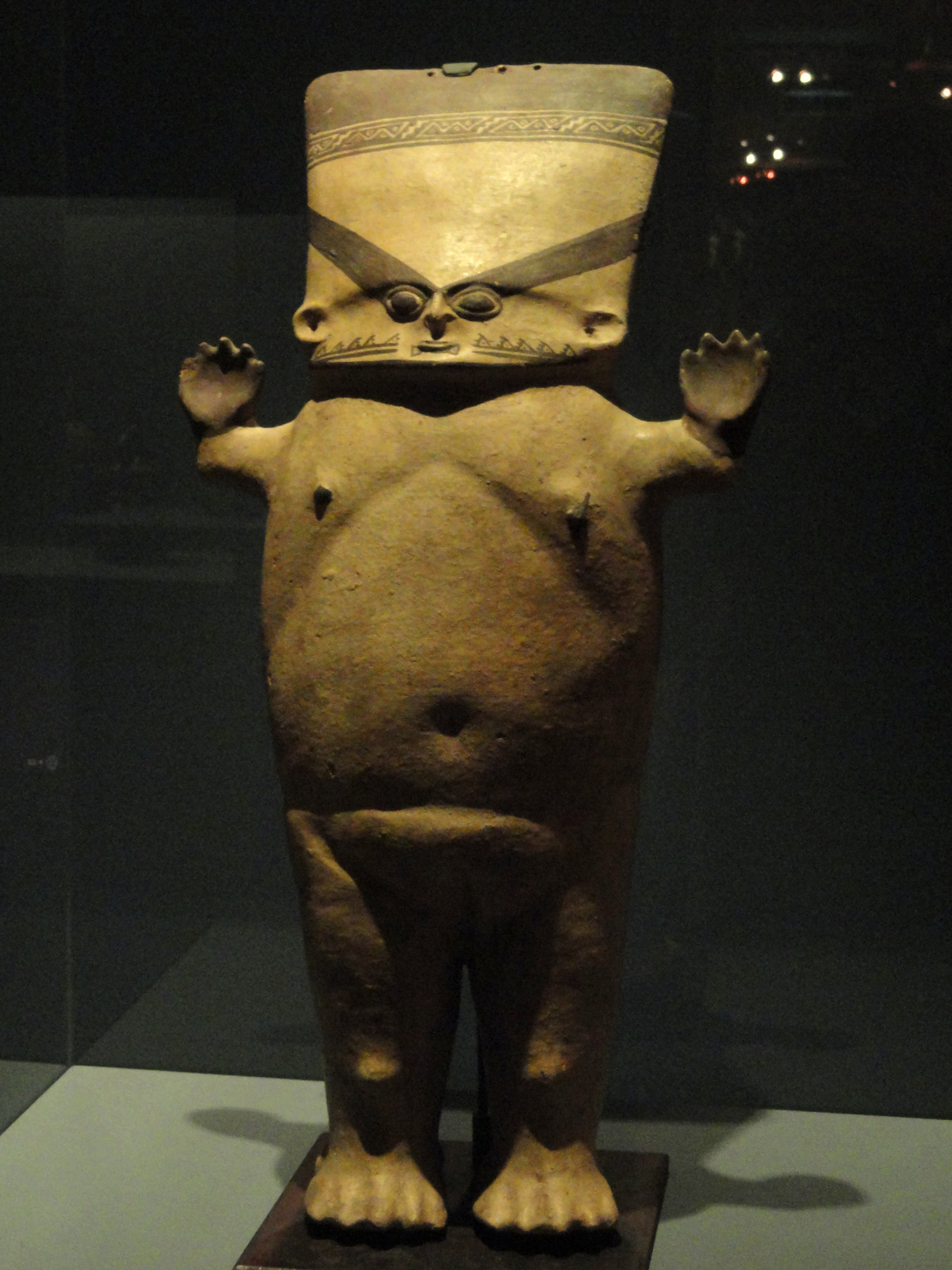 Exhibit from the 'Kunst der Welt' gallery of the Staatliches Museum für Völkerkunde München, Maximilianstraße 42, Munich, Germany. Figure of female, Chancay, Peru, 1000-1450 AD.